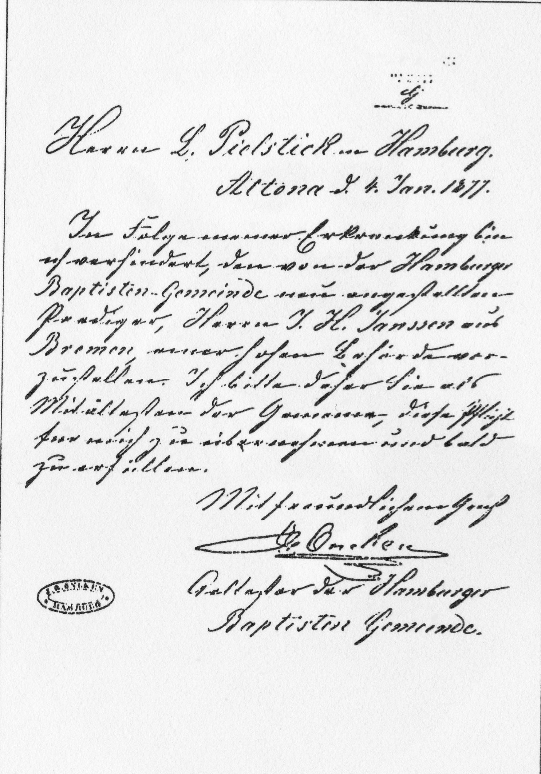 Schreiben Johann Gerhard Onckens an Johann Heinrich Ludwig Pielstick